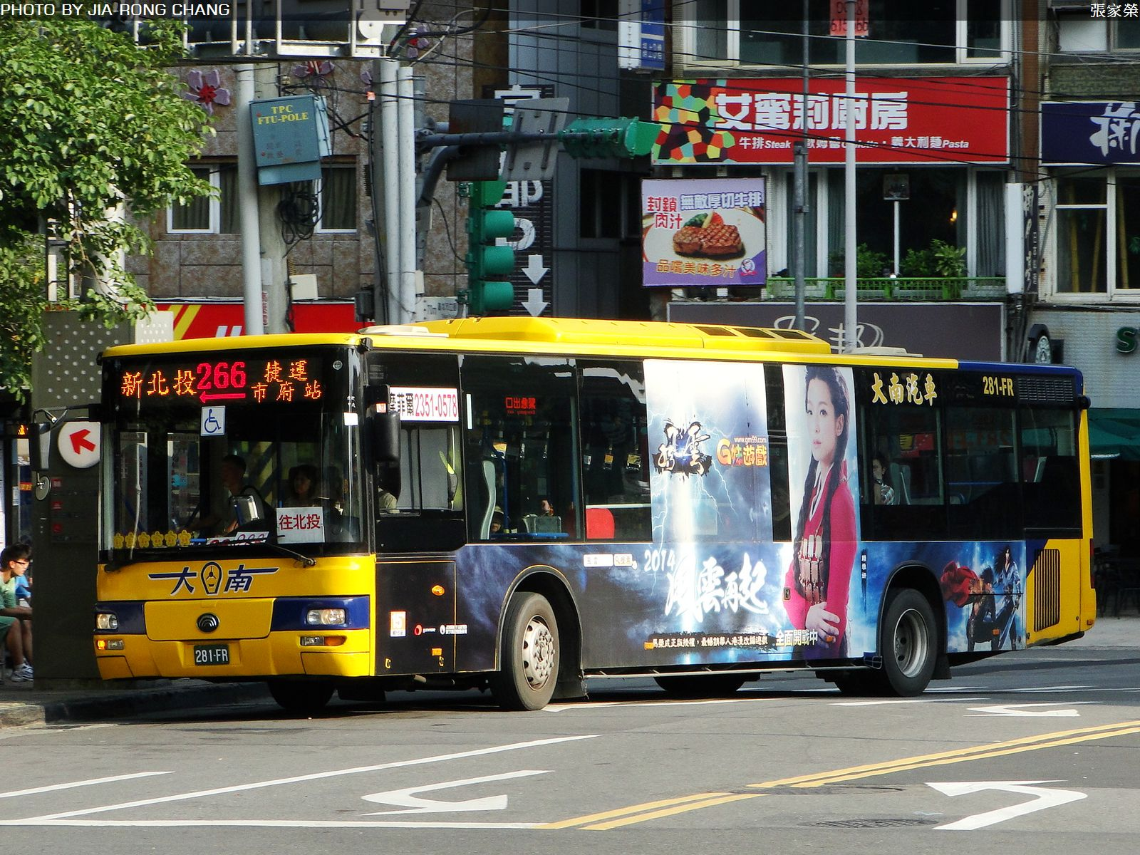 YOUTONG - ZK6128HG - 281-FR